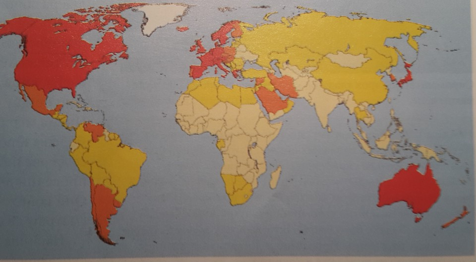 Црвеном бојом су означене богате земље и подручја, наранџастом и жутом средње богате, а светлом бојом сиромашне